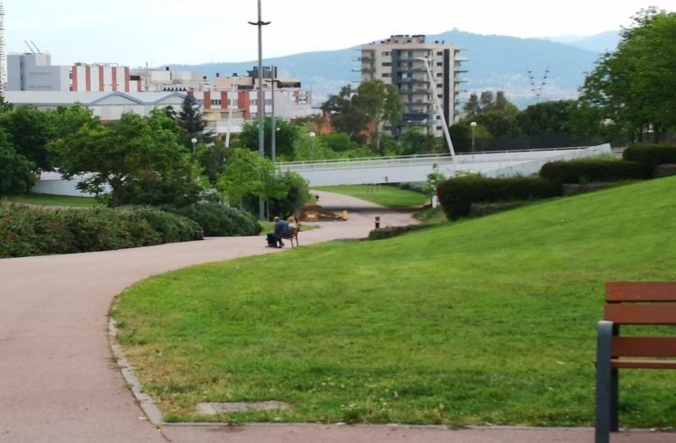 Un dels camins que contrasten amb el verd.